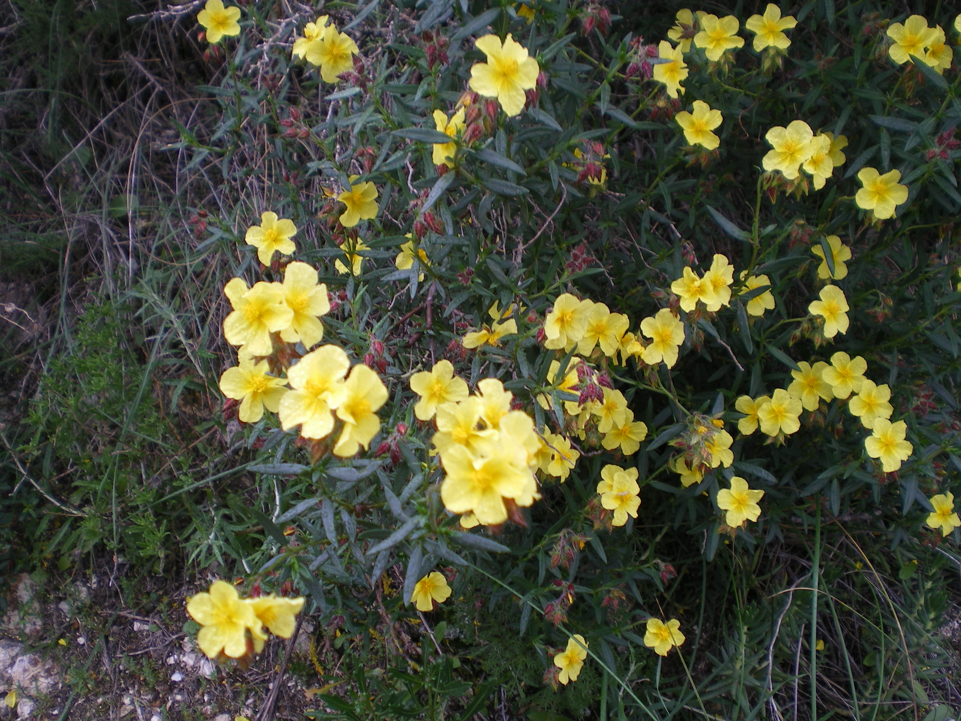 Vista general de Helianthemum alypoides o jarilla de Sorbas, cistacea endémica de la provincia de Almería